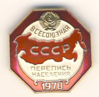 Значок загальносоюзного перепису населення 1970 року.